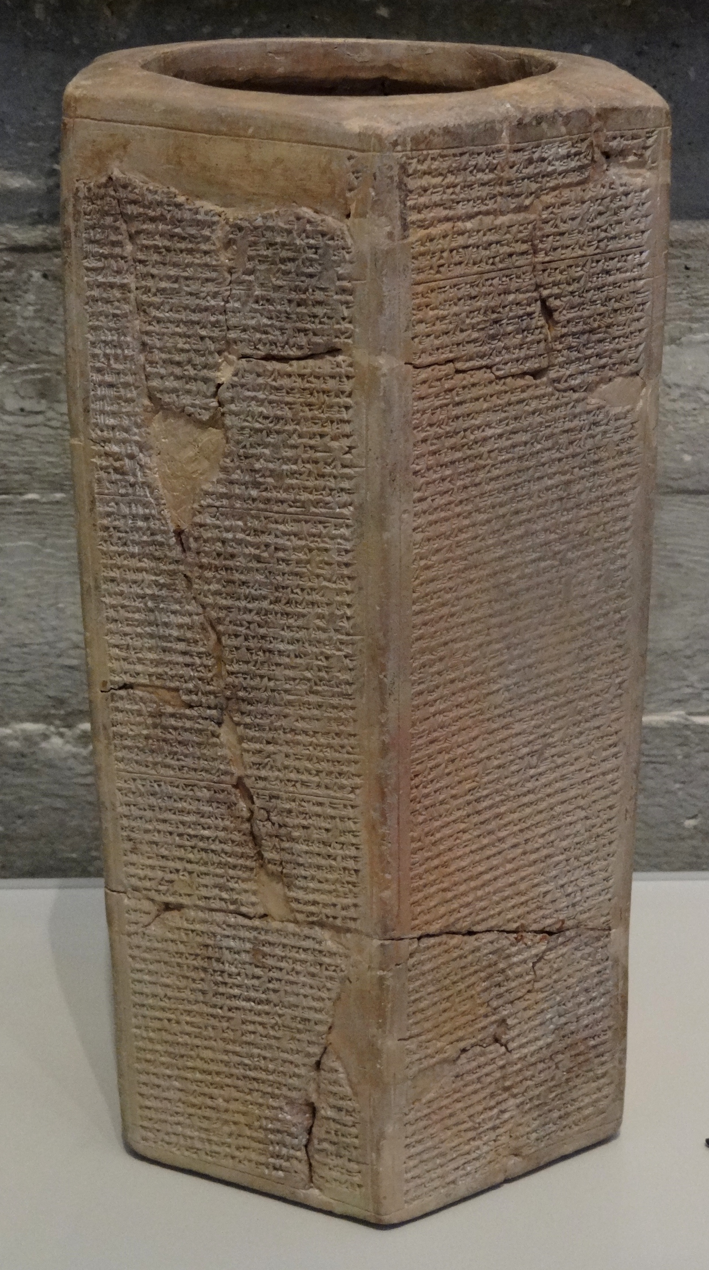 מנסרת סנחריב היא כינוי לאנלים (כרוניקות אשוריות) שנכתבו על גבי מנסרות על ידי סופרי האימפריה האשורית החדשה המנסרה שנמצאת בידי מוזיאון ישראל